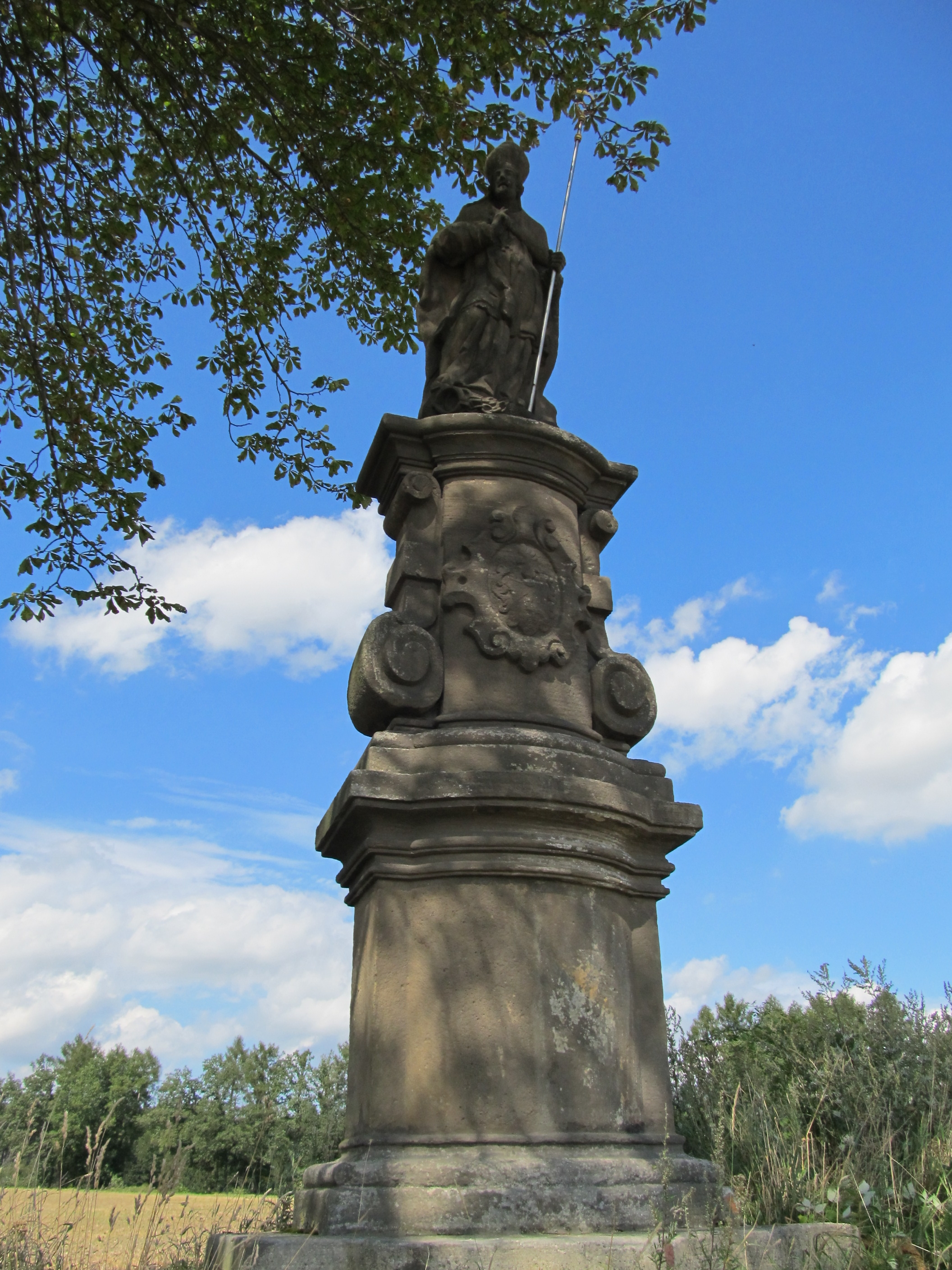 Socha sv. Linharta při cestě na Újezdec, Chvalkovice